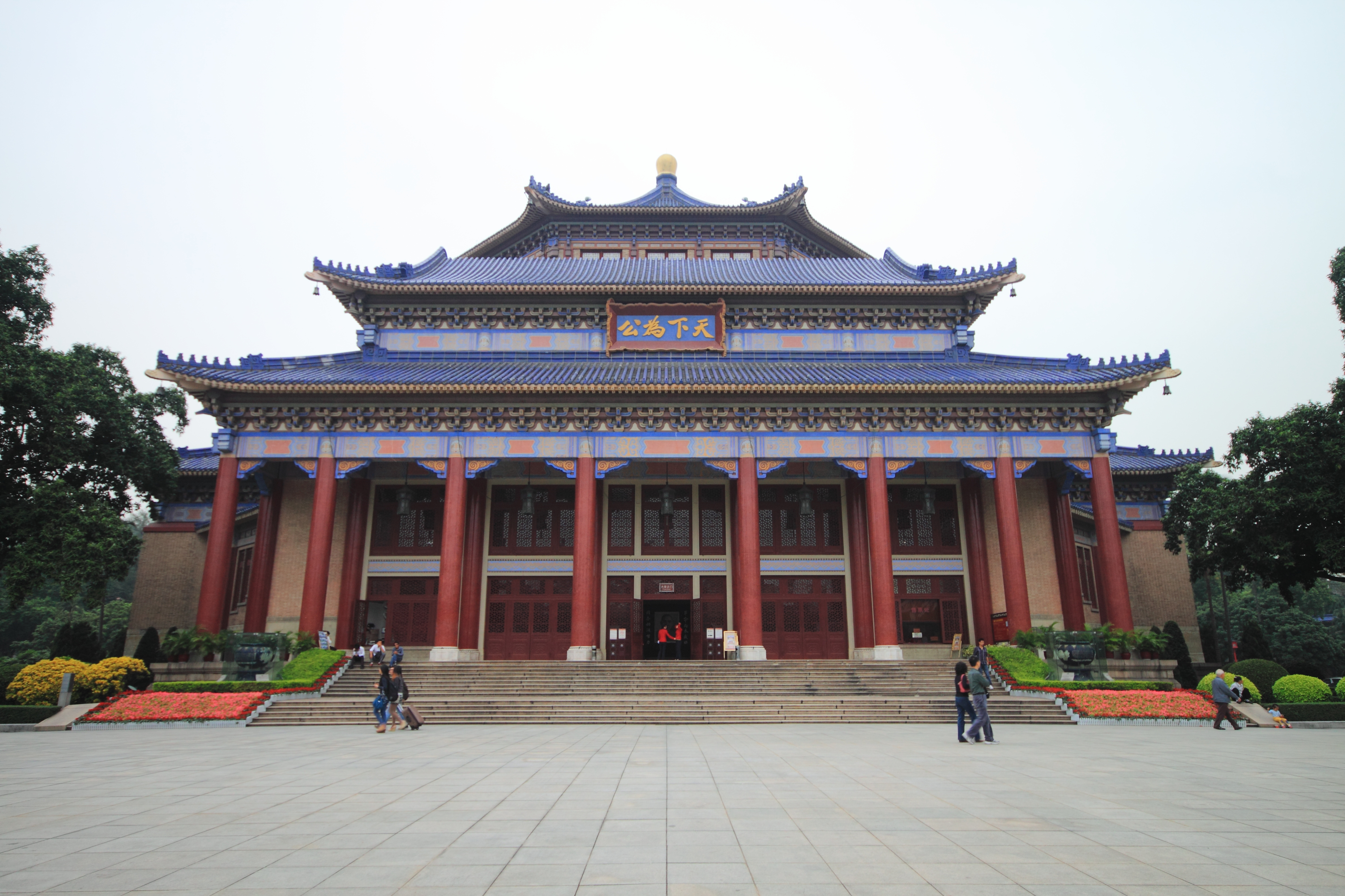 广州中山纪念堂 —— 南面